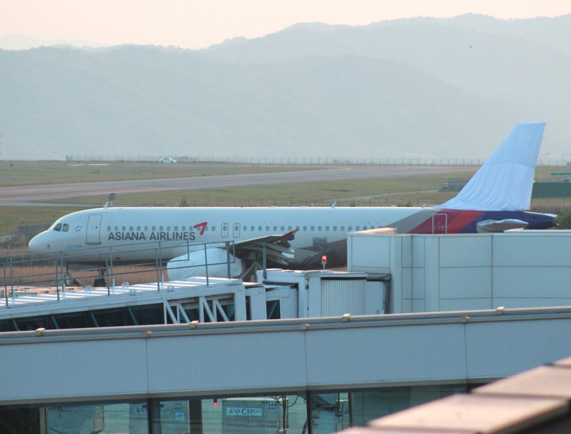 アシアナ航空162便着陸失敗事故の事故機（HL7762）